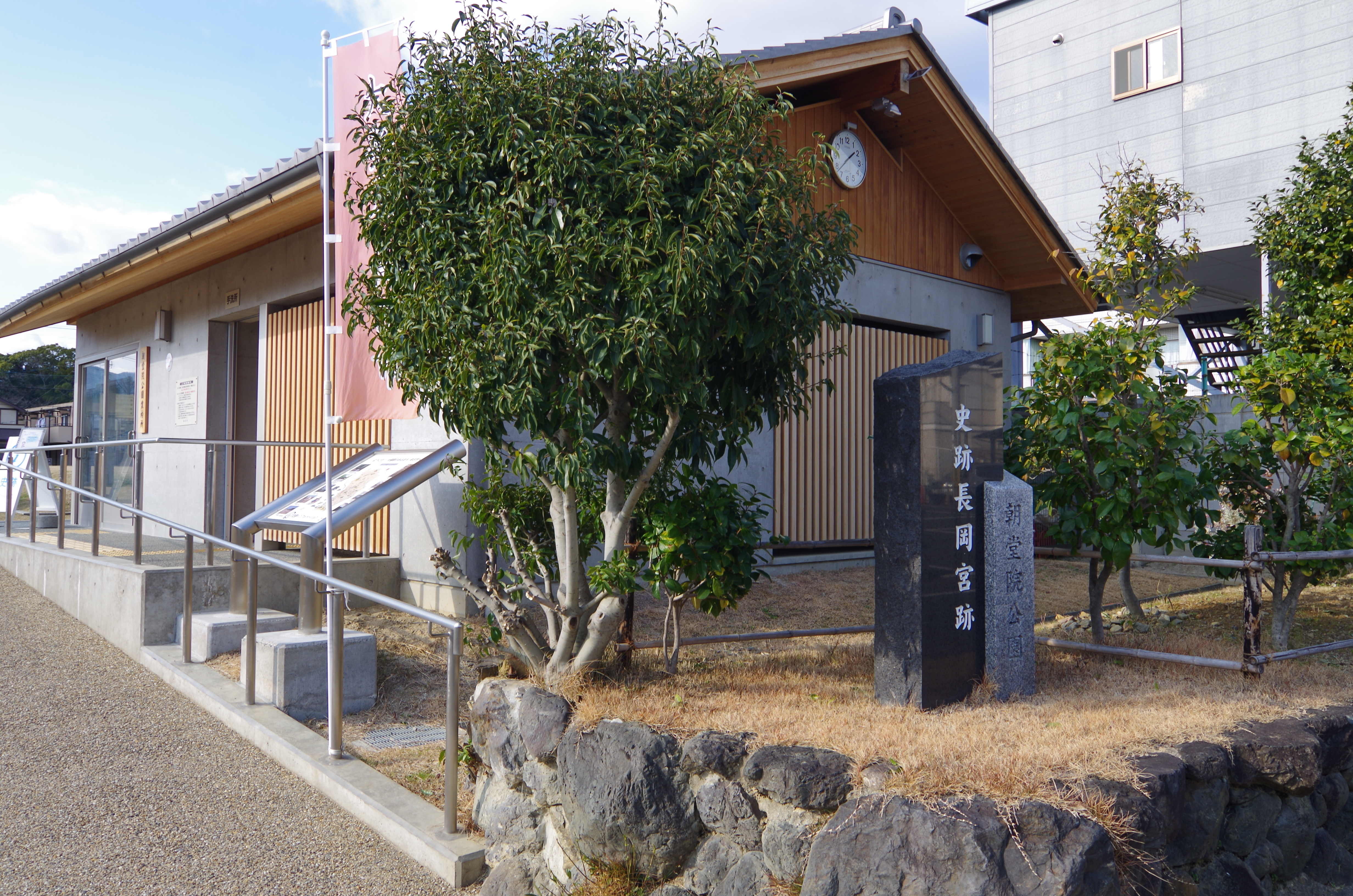 史跡長岡宮跡 朝堂院公園 2013.12.23